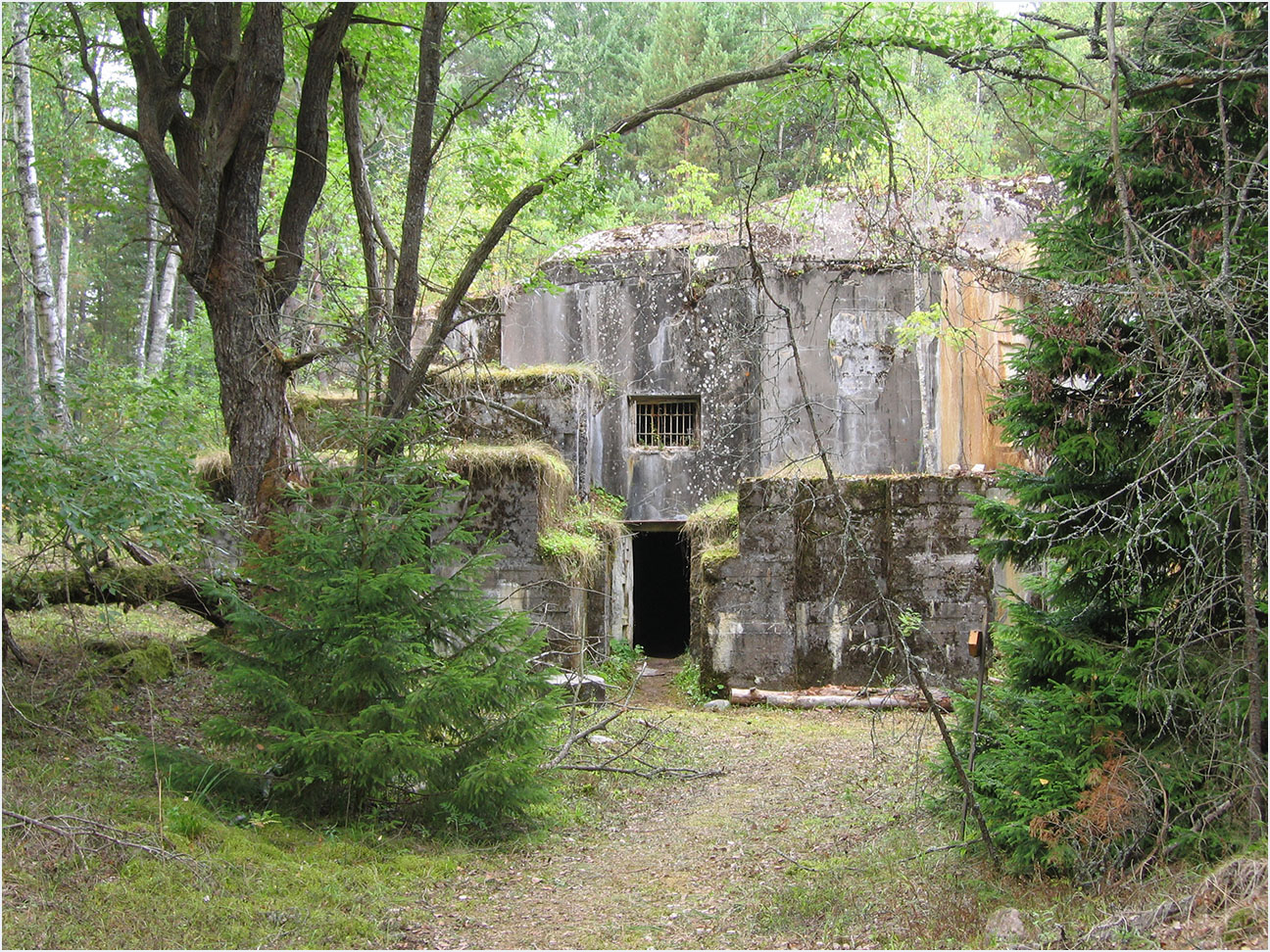 Naissaare rannapatarei nr 10a